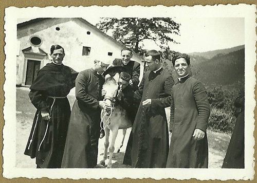 Don Francesco Babini è il prete più in alto in sella all'asino.